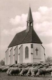 Muttergotteshäuschen in Düren eigenes Foto ca. 1960 papa1234